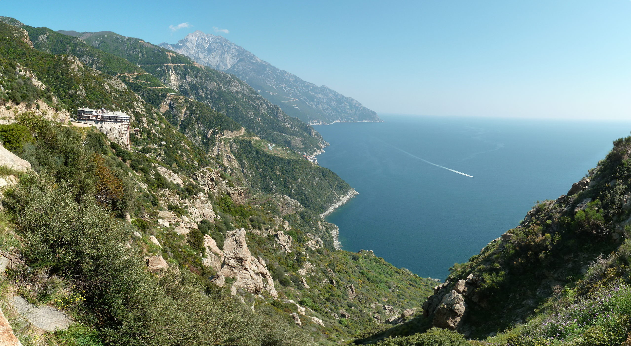 Vue sur le monastère de Simonos Petras (Mont Athos)